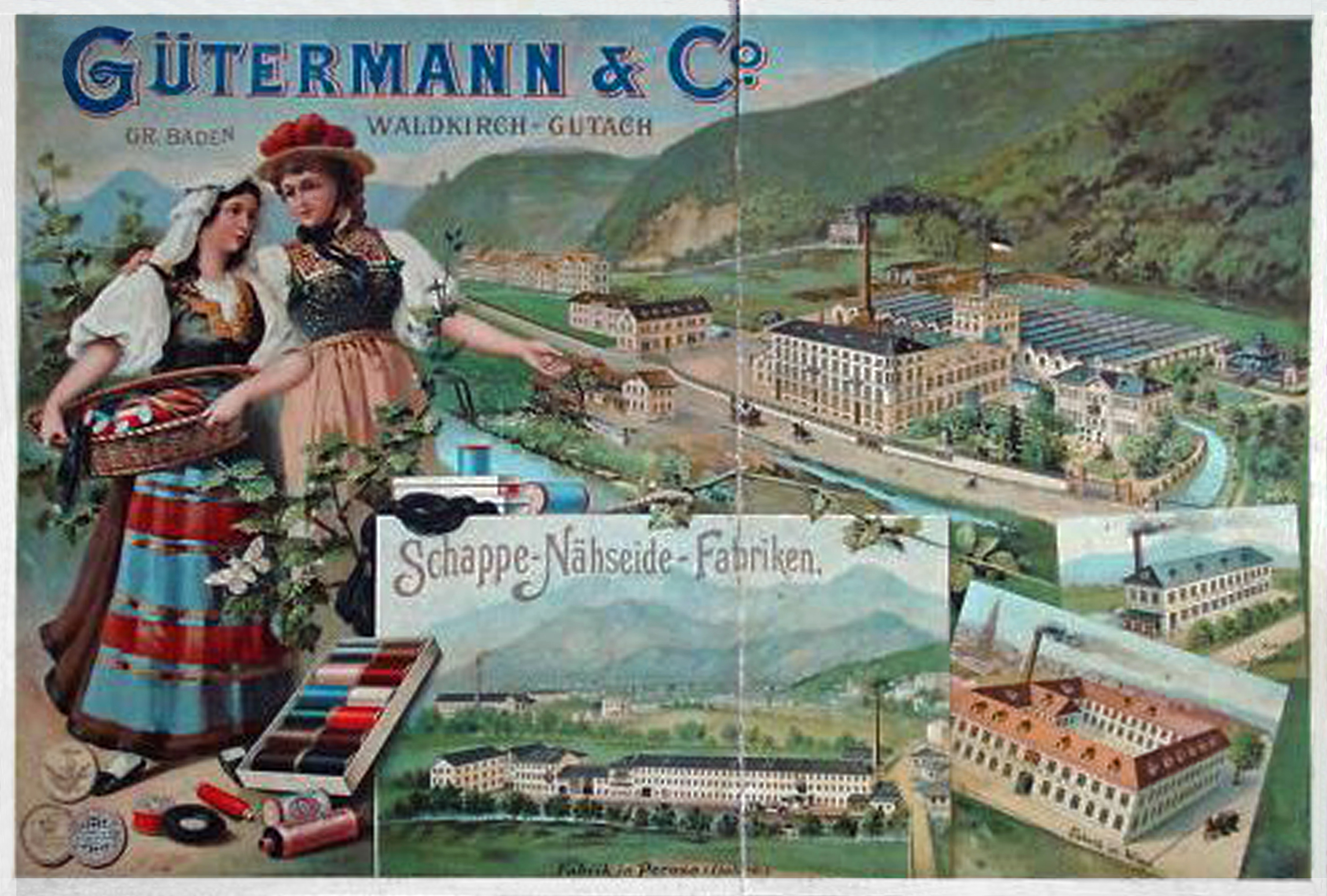 Werbeplakat um 1890 (Chromolithografie, aufgezogen auf Pappe) der Firma Gütermann Nähseide in Waldkirch-Gutach (Schwarzwald) mit drei kleinen Ansichten ihrer Filialen Schappe-Nähseide-Fabrik in Perosa (Italien, die Frau links trägt auch Tracht von Perosa), den Fabriken in Wien und in Precht(h)al. Größe ca. 60 x 90 cm.